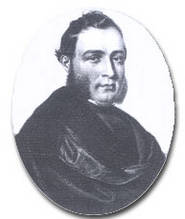 Nicola Sole poeta